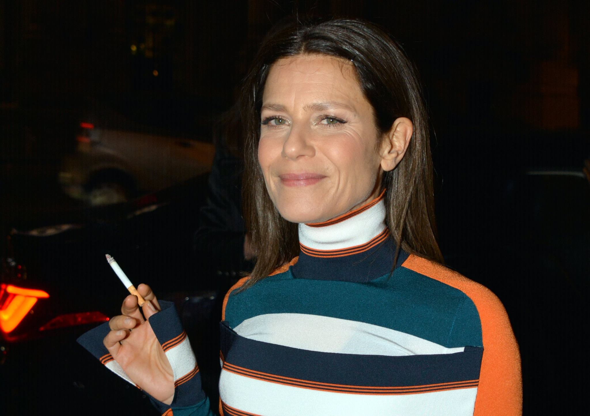 Marina Foïs au dîner des révélations des César du cinéma